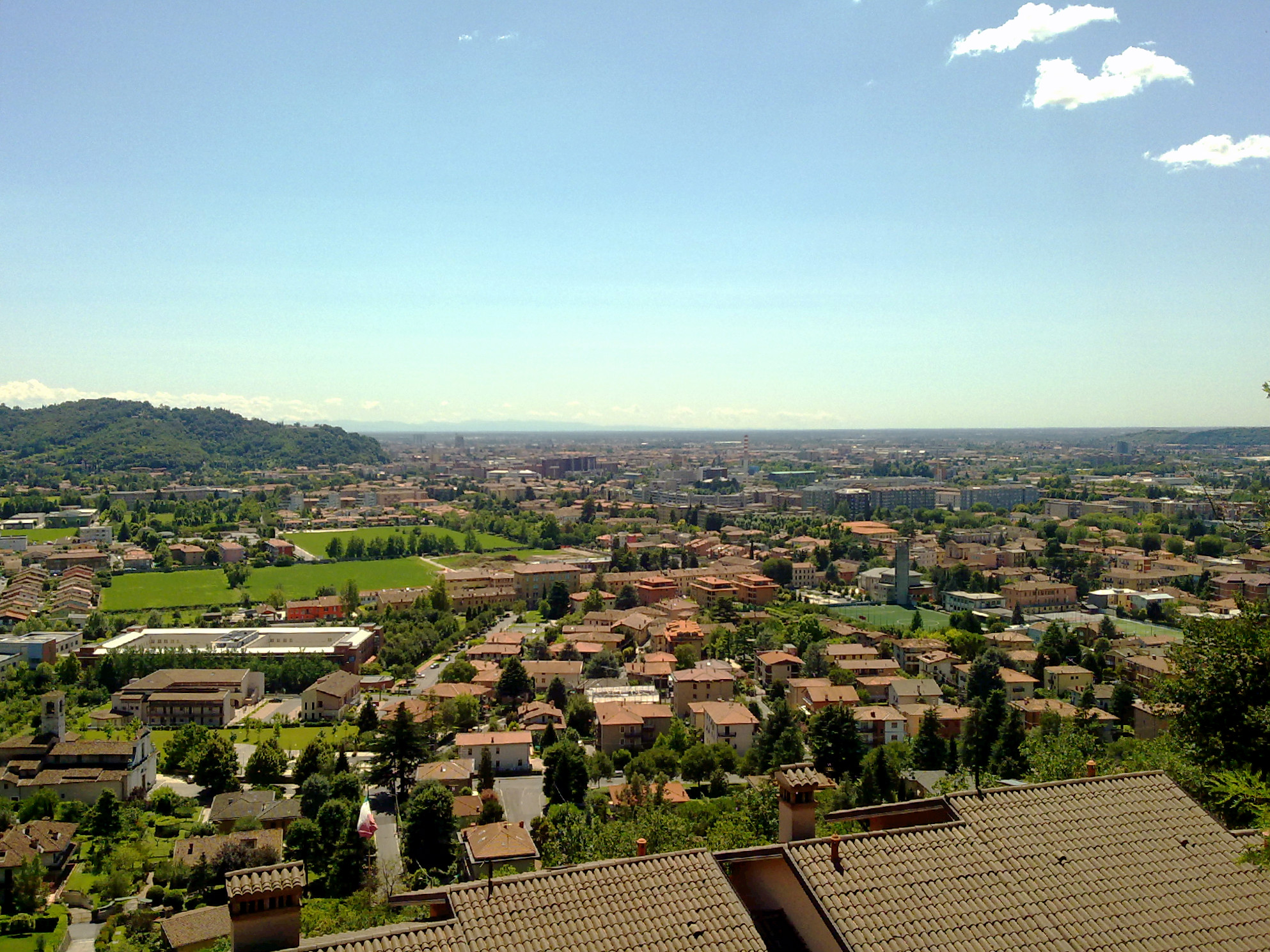 Vista dalla strada per Castello Malvezzi (da Mompiano)